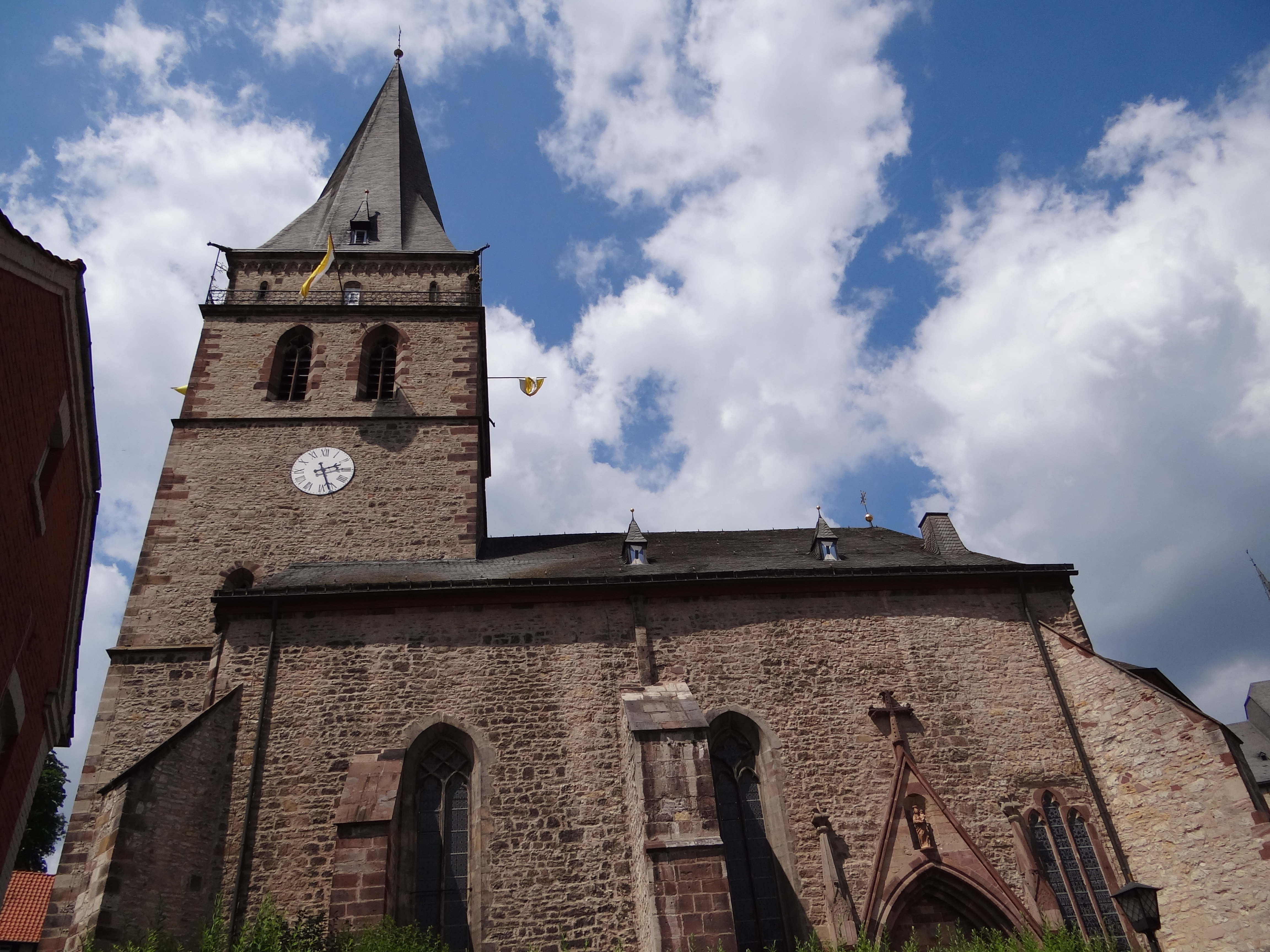 Warburg, Germany